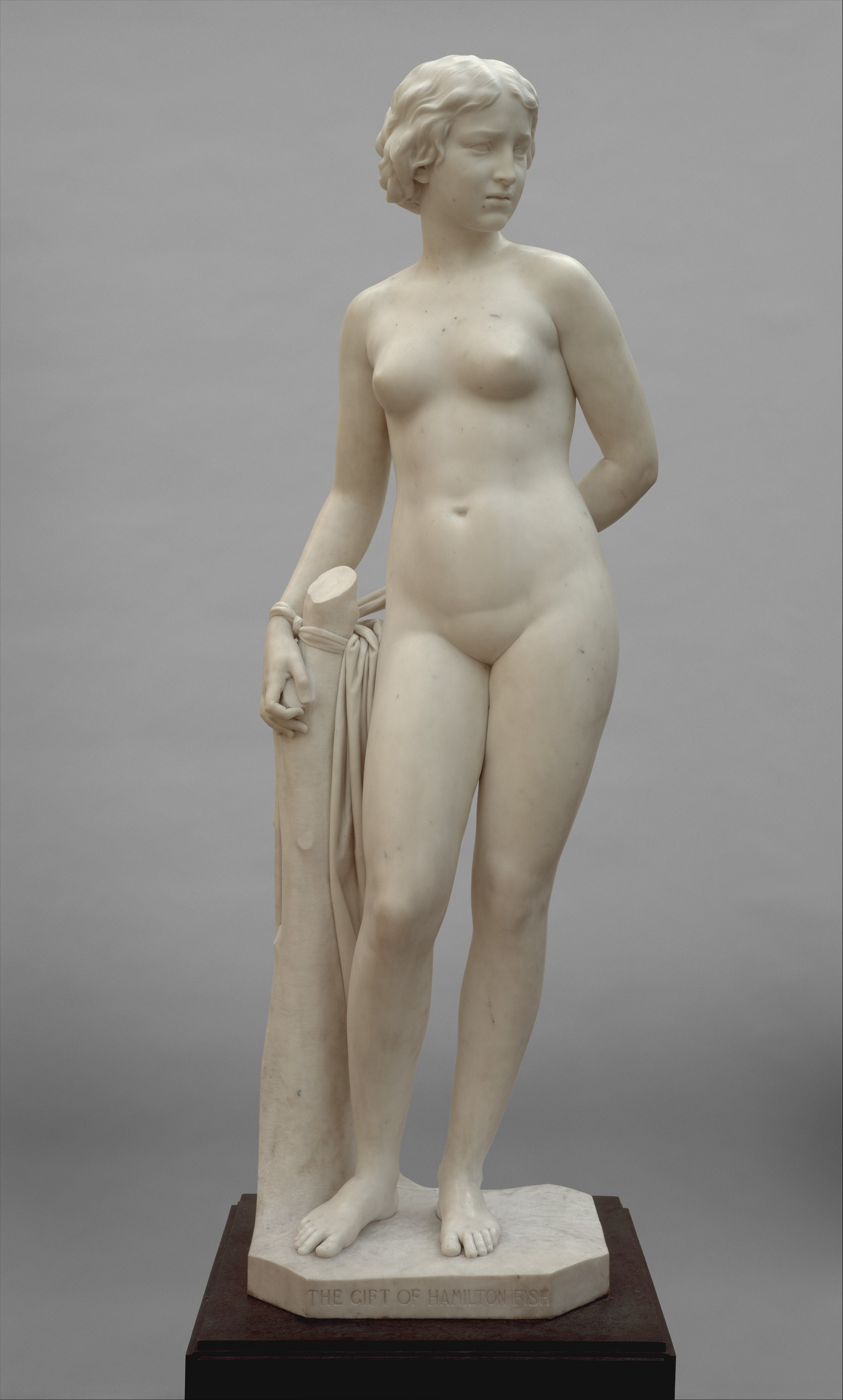 Sculpture; Sculpture